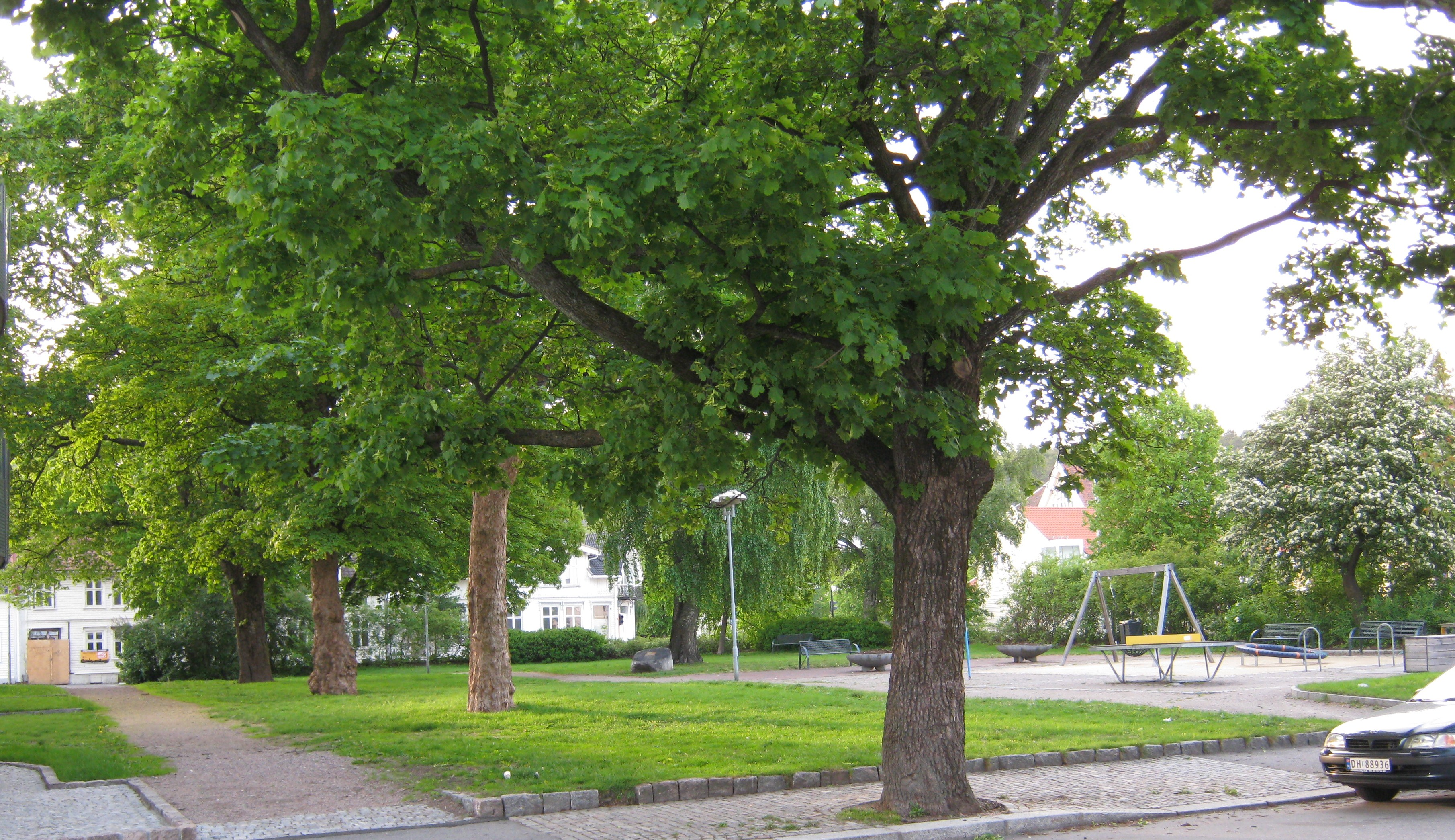 Stener Heyerdals Plass, Kristiansand